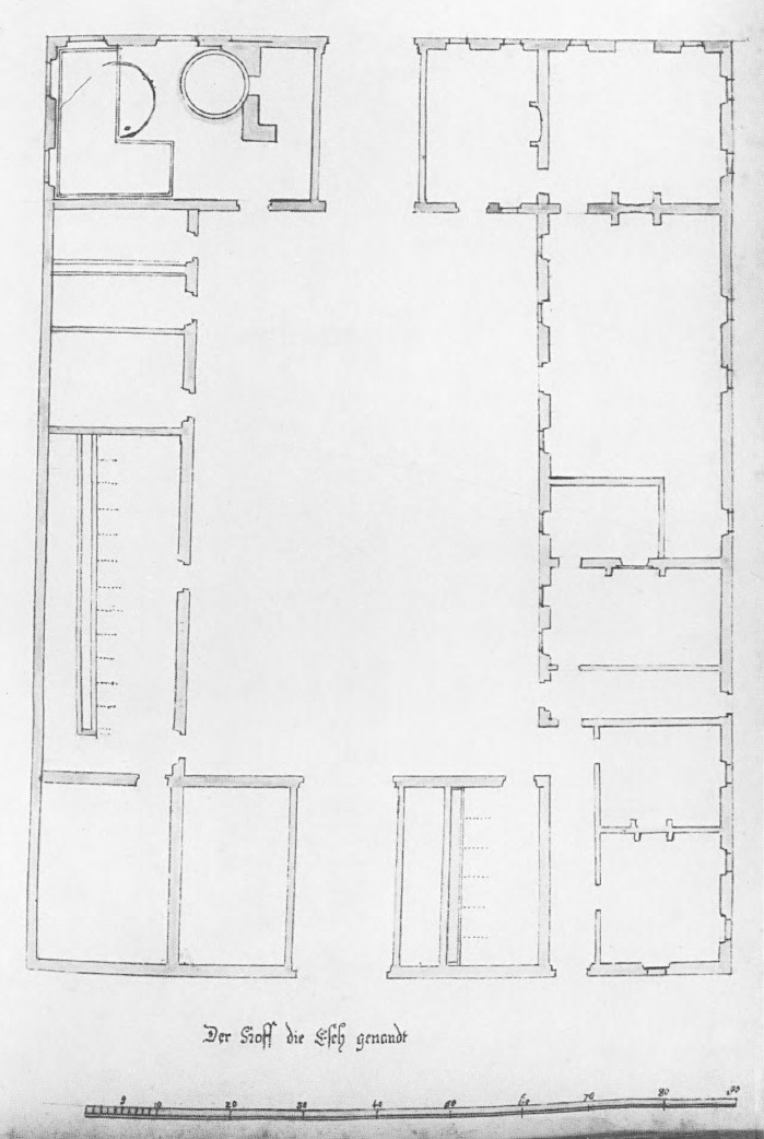 Grundrisszeichnung des Hauses De Esch in Vaals